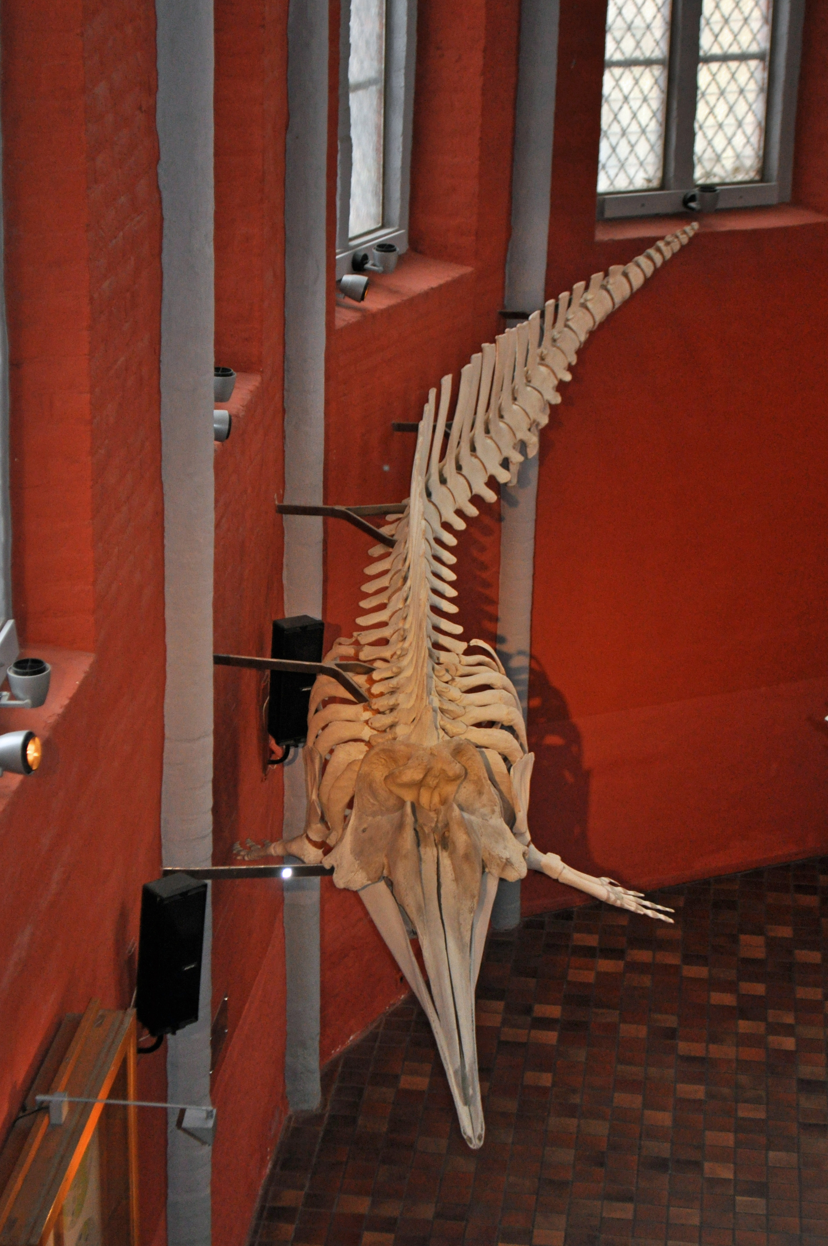 Stralsund, im Meeresmuseum (2013-02-13), by Klugschnacker in Wikipedia (47)